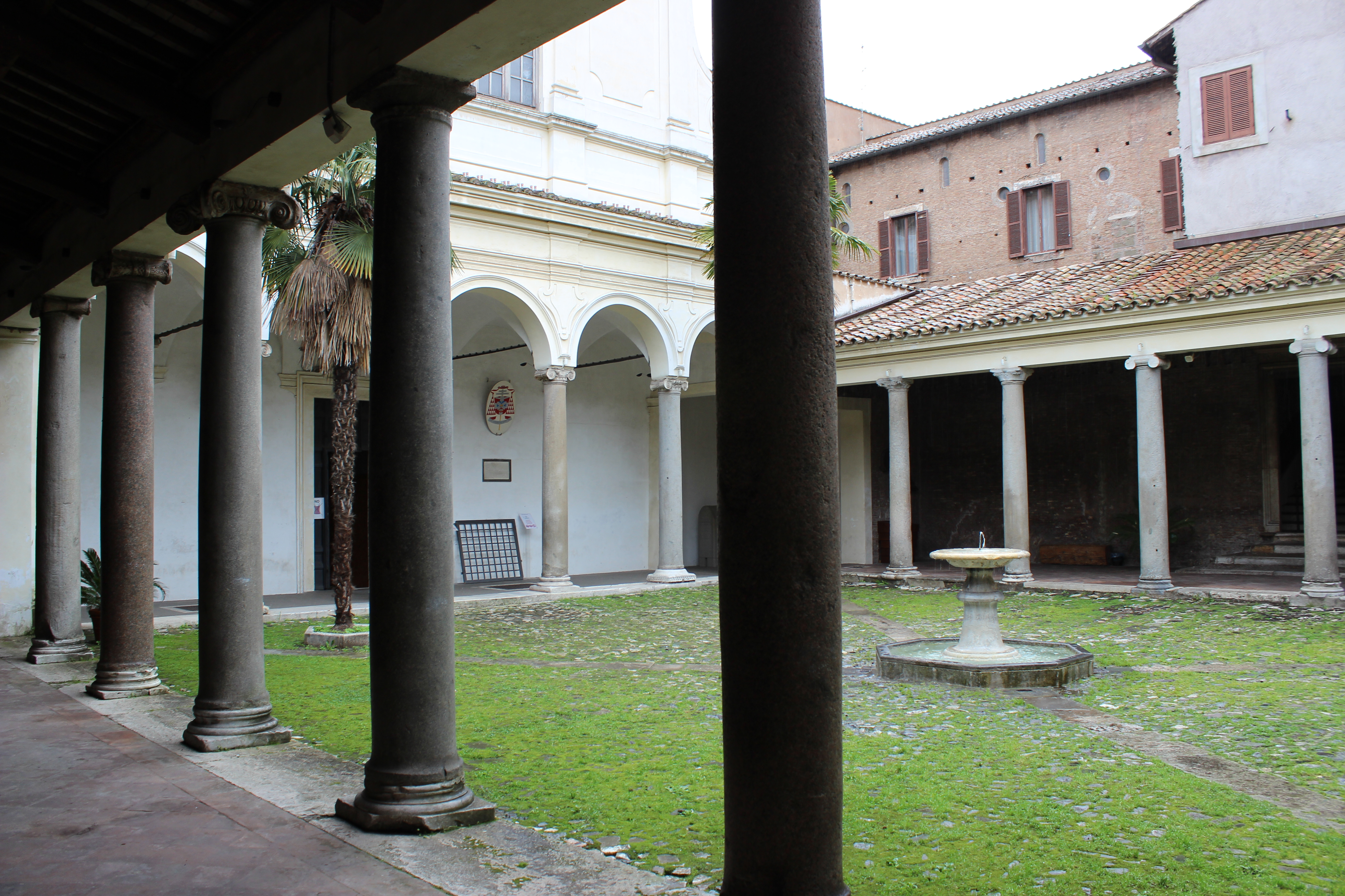 Roma. San Clemente. Atrio.